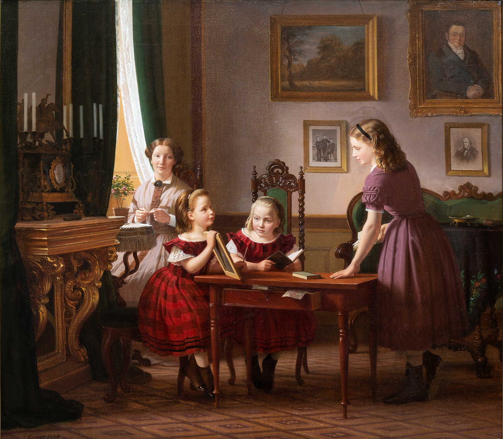 Portræt af Jenny Raphael Adler med sine døtre Ellen, Hanna og Emma